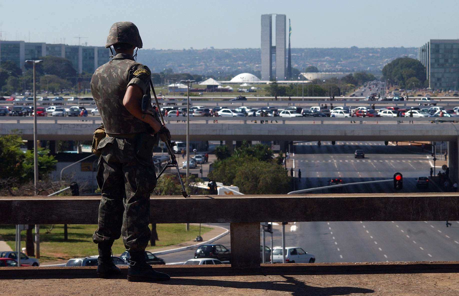 Brasília - Soldados do Exército cuidam da segurança para reunião da Cúpula Extraordinária de Chefes de Estado da União de Nações Sul-Americanas (Unasul).